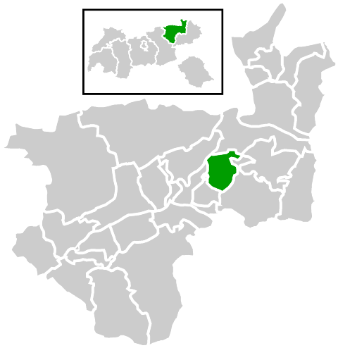 Lage der Gemeinde innerhalb des Bezirks Kufstein